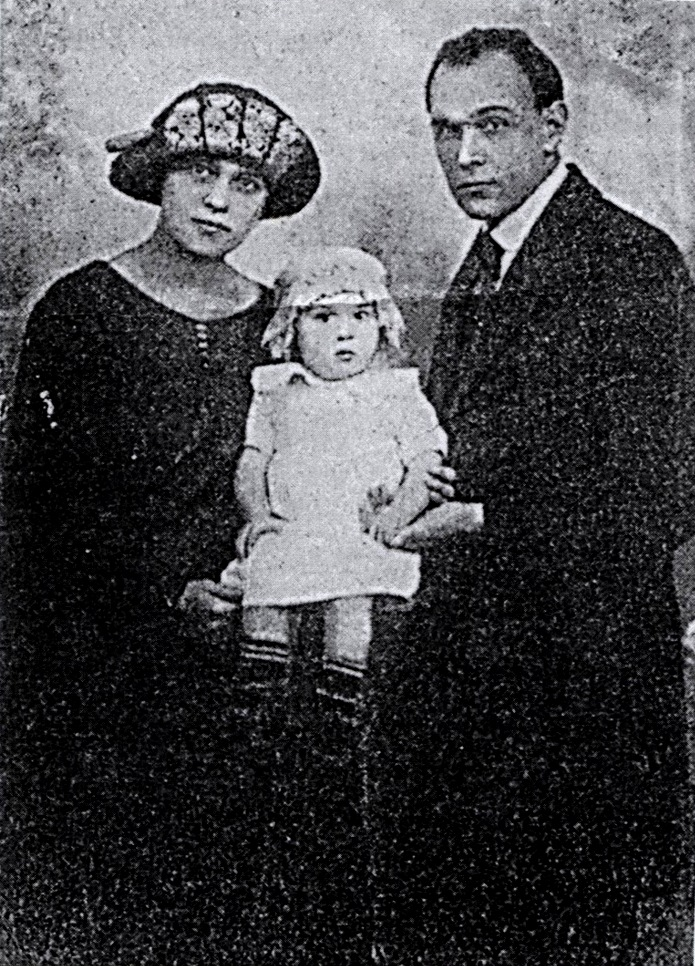 Клим Поліщук і Галина Мневська: Клим Поліщук зі своєю дружиною Галиною Мневською (Галина Орлівна) та донькою